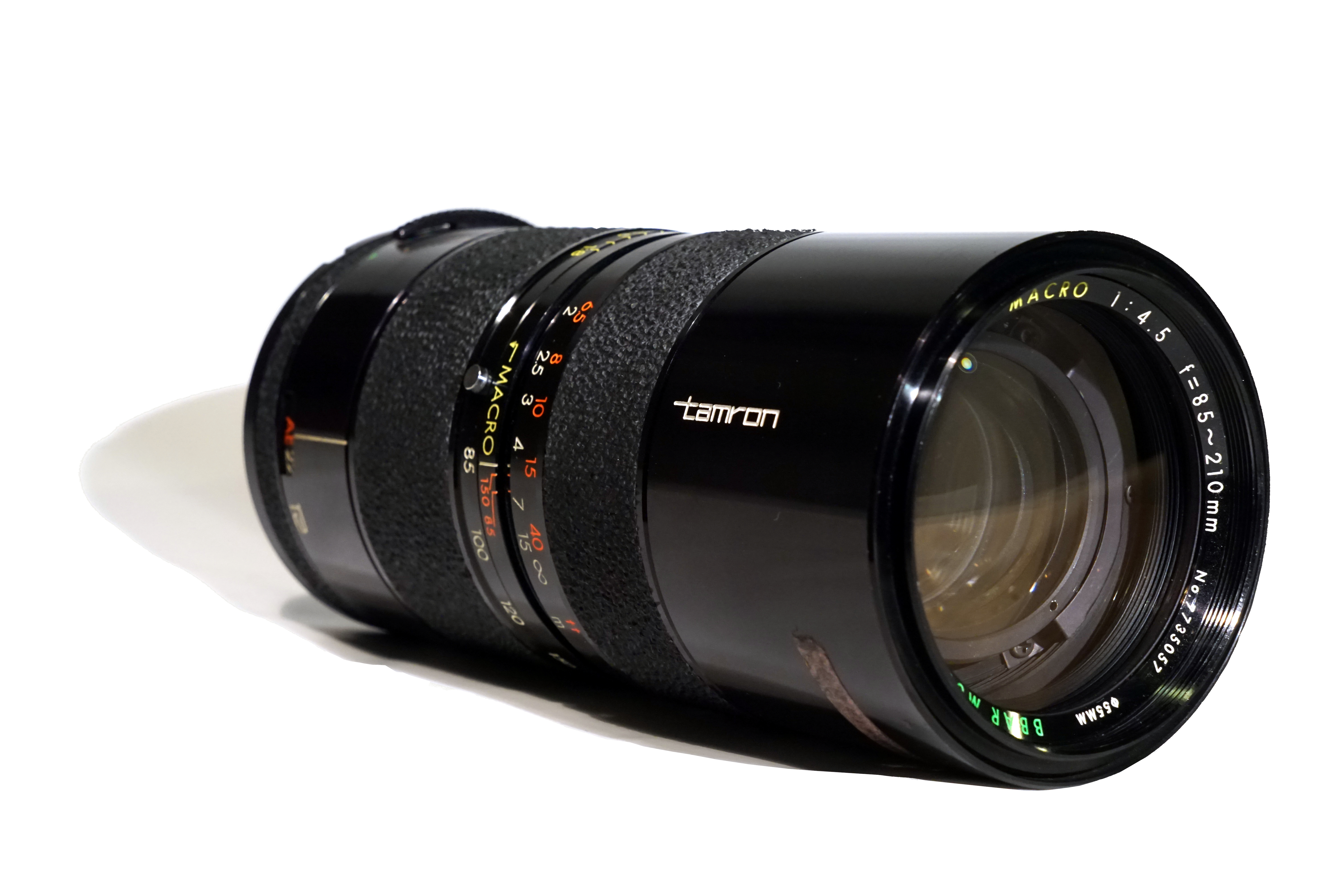 Das Objektiv Tamron f/ 4.5 85-210mm / Adaptall-mount